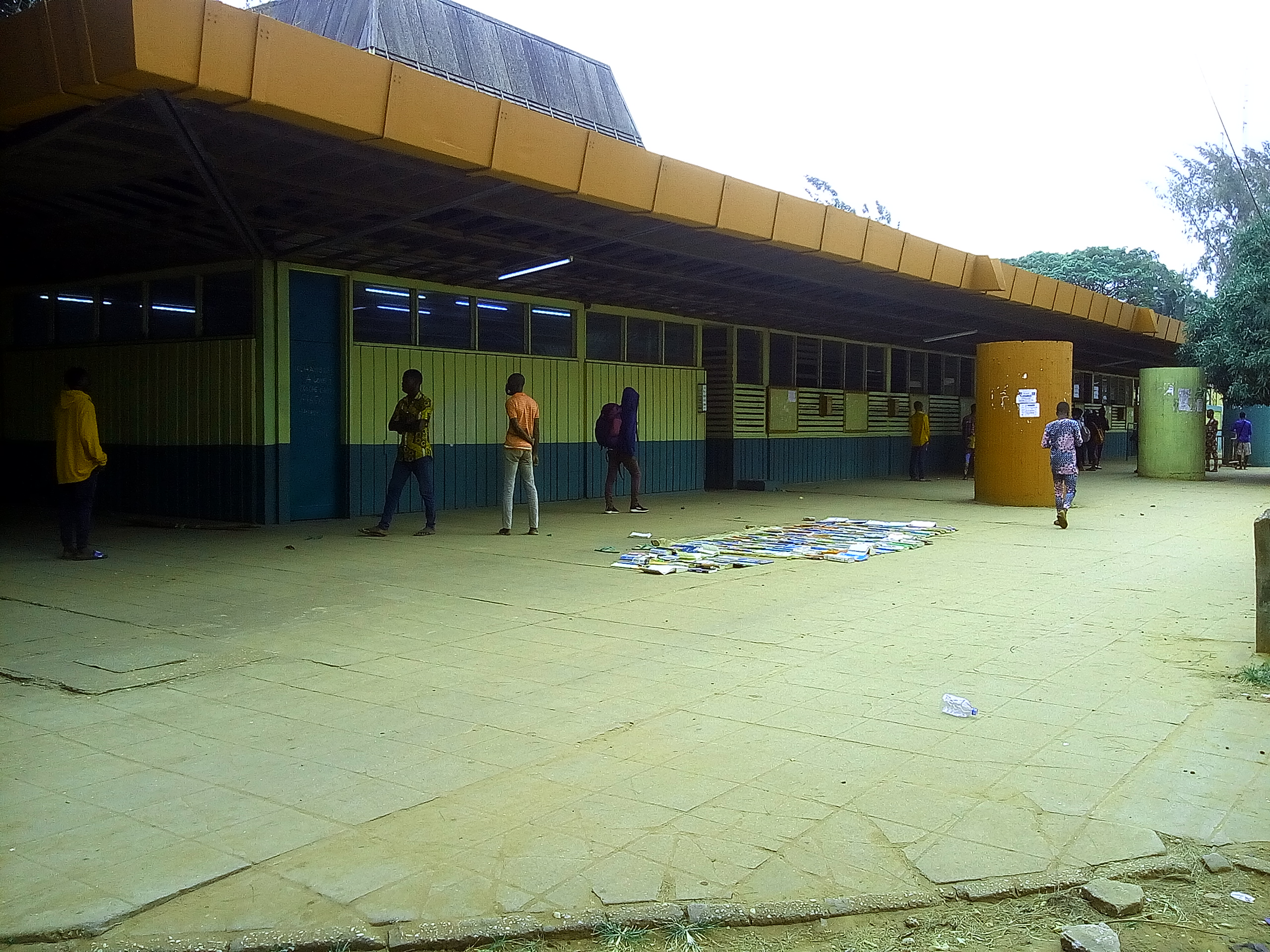 uac- resto-u- bénin